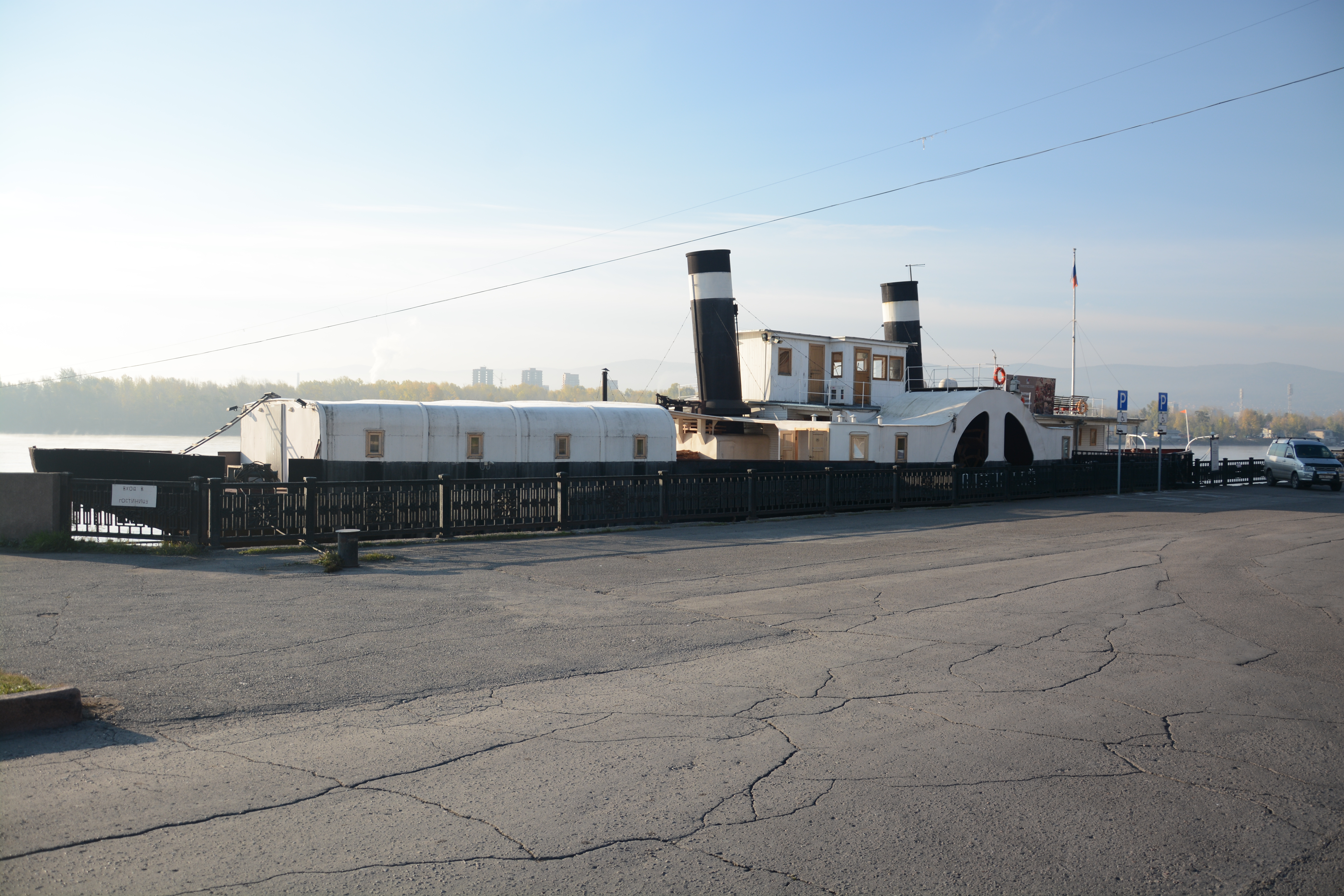 Пароход "Святой Николай", перевозивший в 1890-х гг. политссыльных по р.Енисей: набережная р.Енисей, причал, Красноярск, Красноярский край